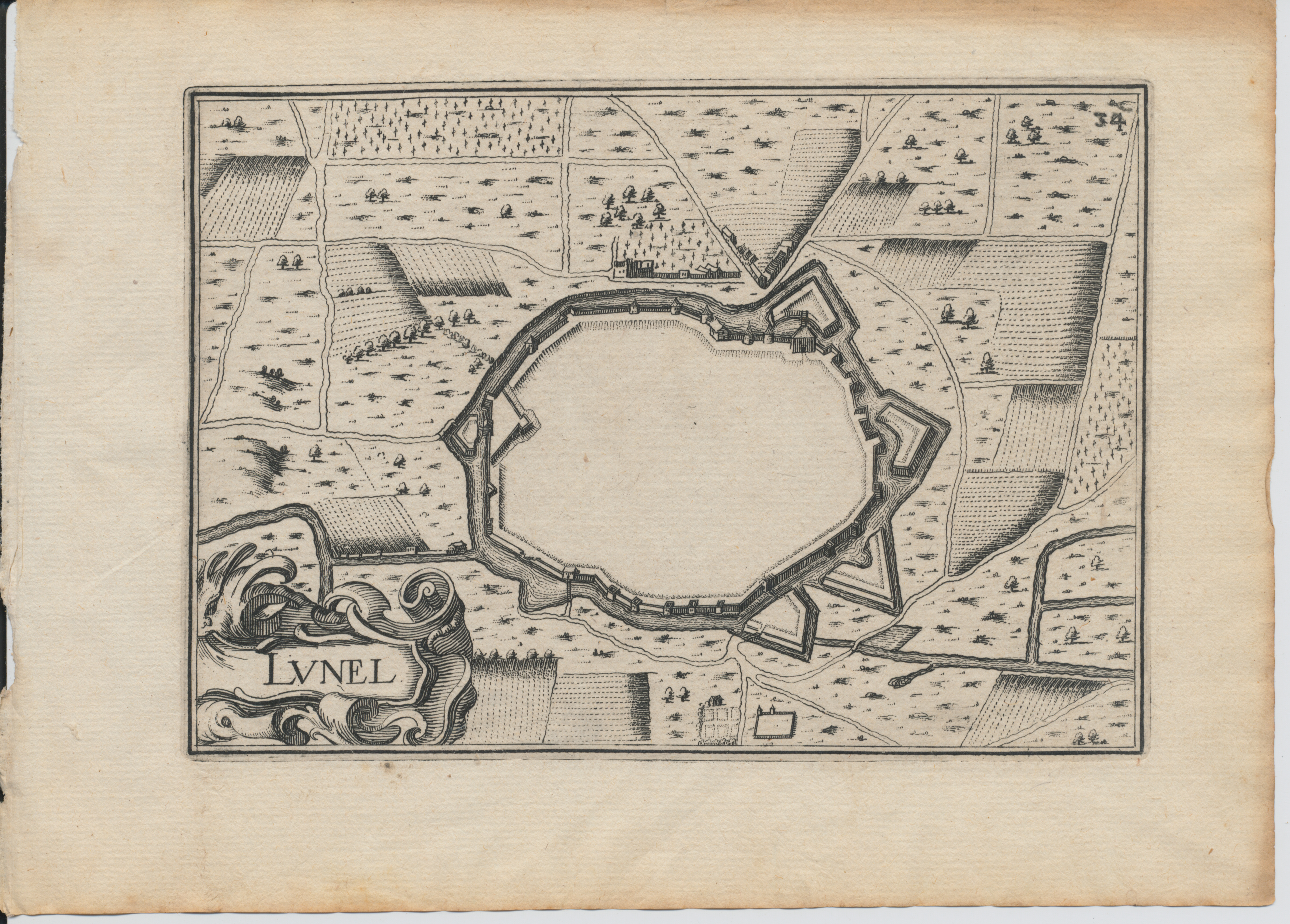 Gravure extraite de "Les Plans et Profils de toutes les principales villes et lieux considérables de France. par le Sieur TASSIN, géographe ordinaire de sa Majesté. A paris, Chez Melchior Tavernier, en l'Isle du Palais. 1634" (Province de Languedoc)